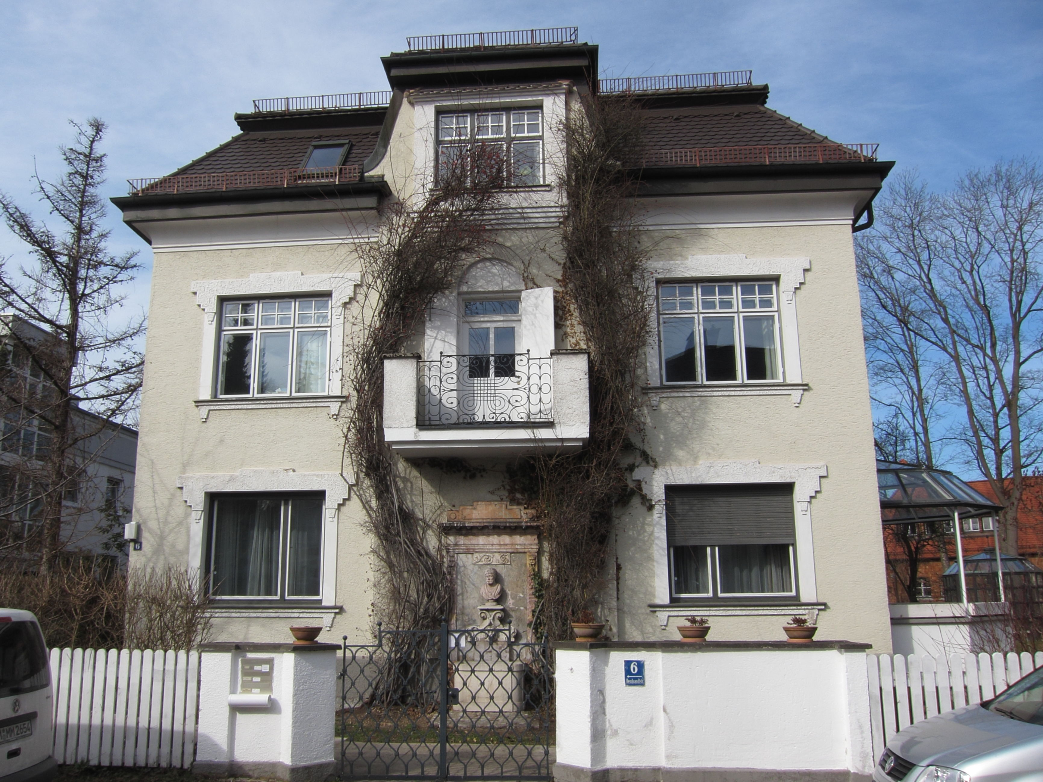 Rembrandtstraße 6; Villa, mit antikischem Wandbrunnen, 1901 von Georg Niggl.